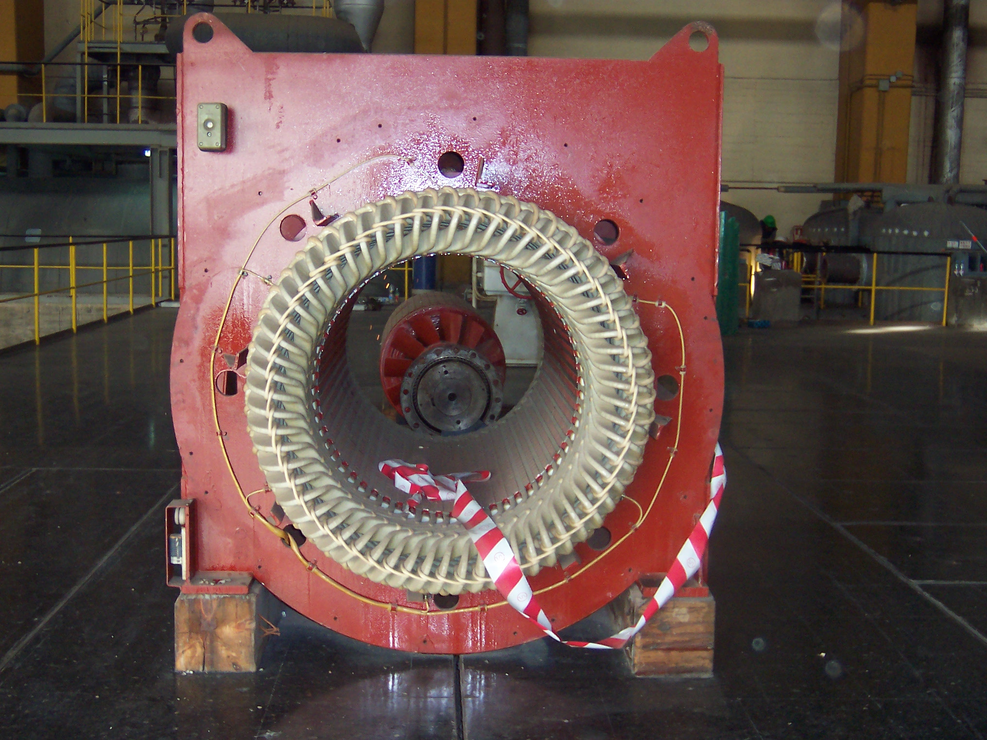 estator de l'alternador d'una central tèrmica